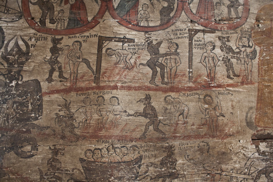 Biserica de lemn din Cehei, judeţul Sălaj.